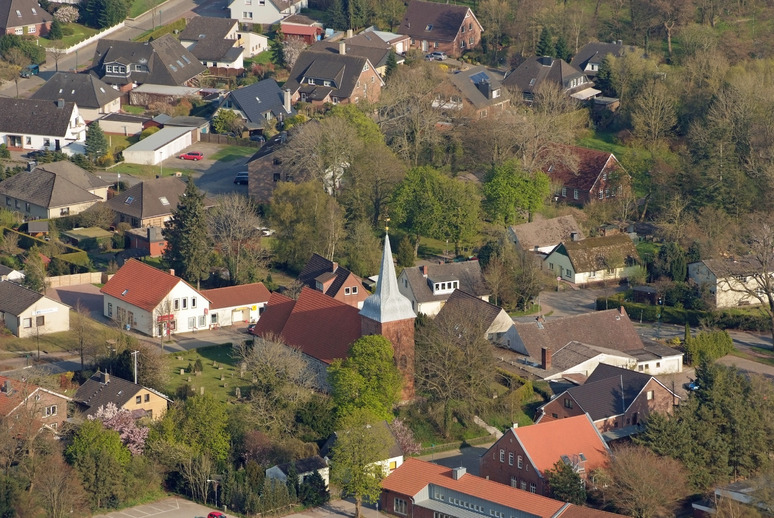 Kirche in Midlum (Land Wursten) / Fotoflug von Nordholz-Spieka nach Oldenburg und Papenburg